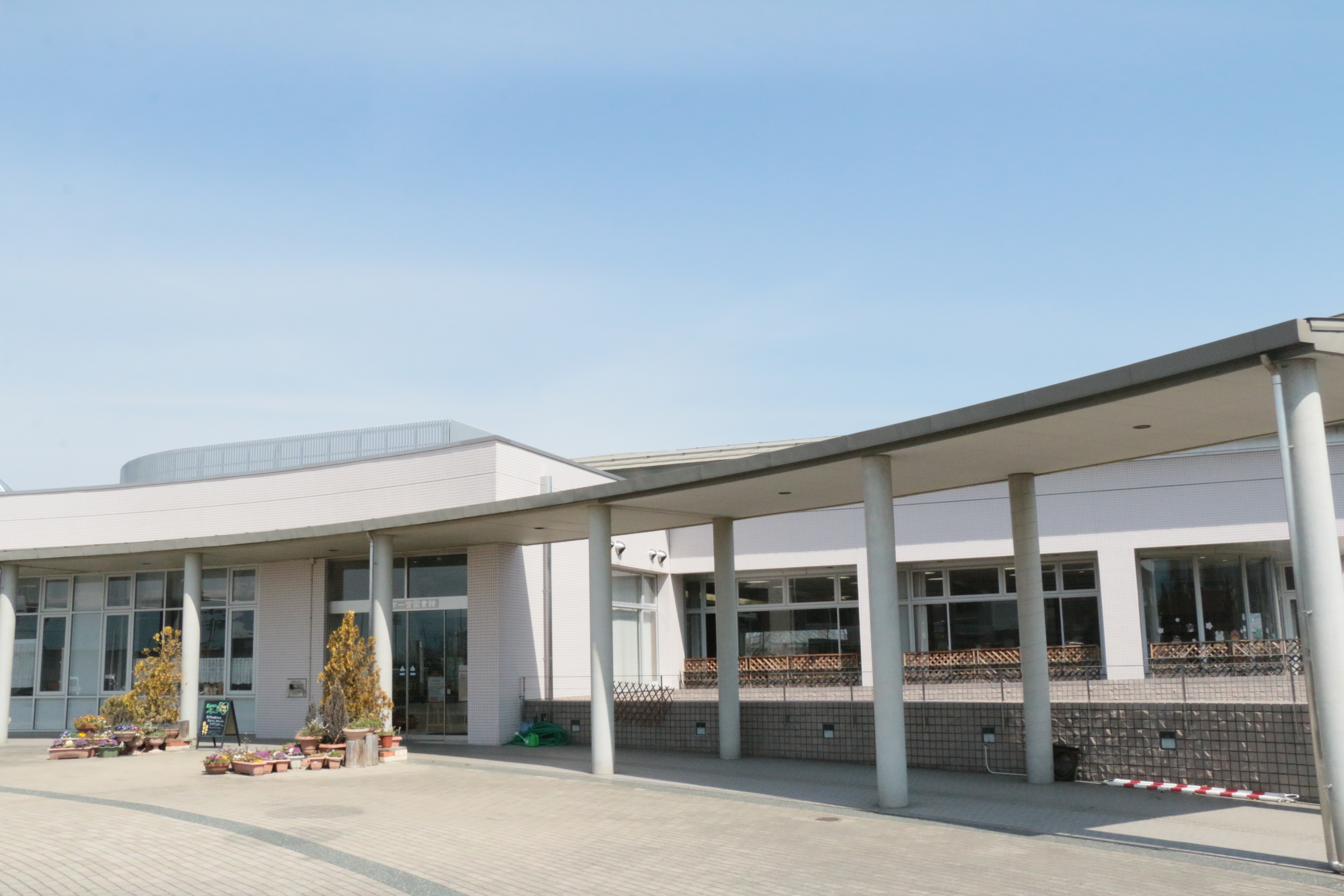 笛吹市一宮図書館